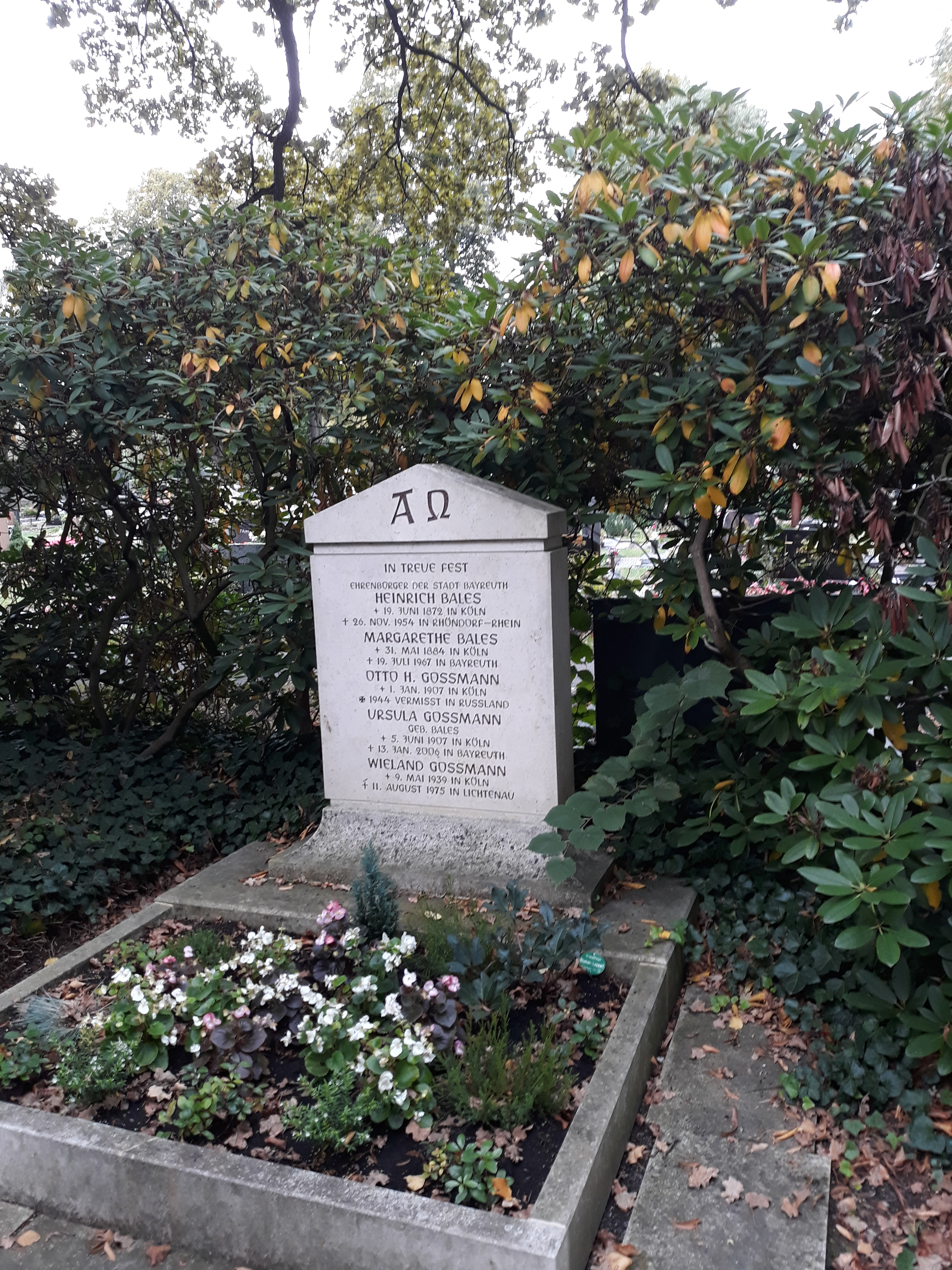 Das Familiengrab des Bayreuther Ehrenbürgers Heinrich Bales auf dem Stadtfriedhof Bayreuth.